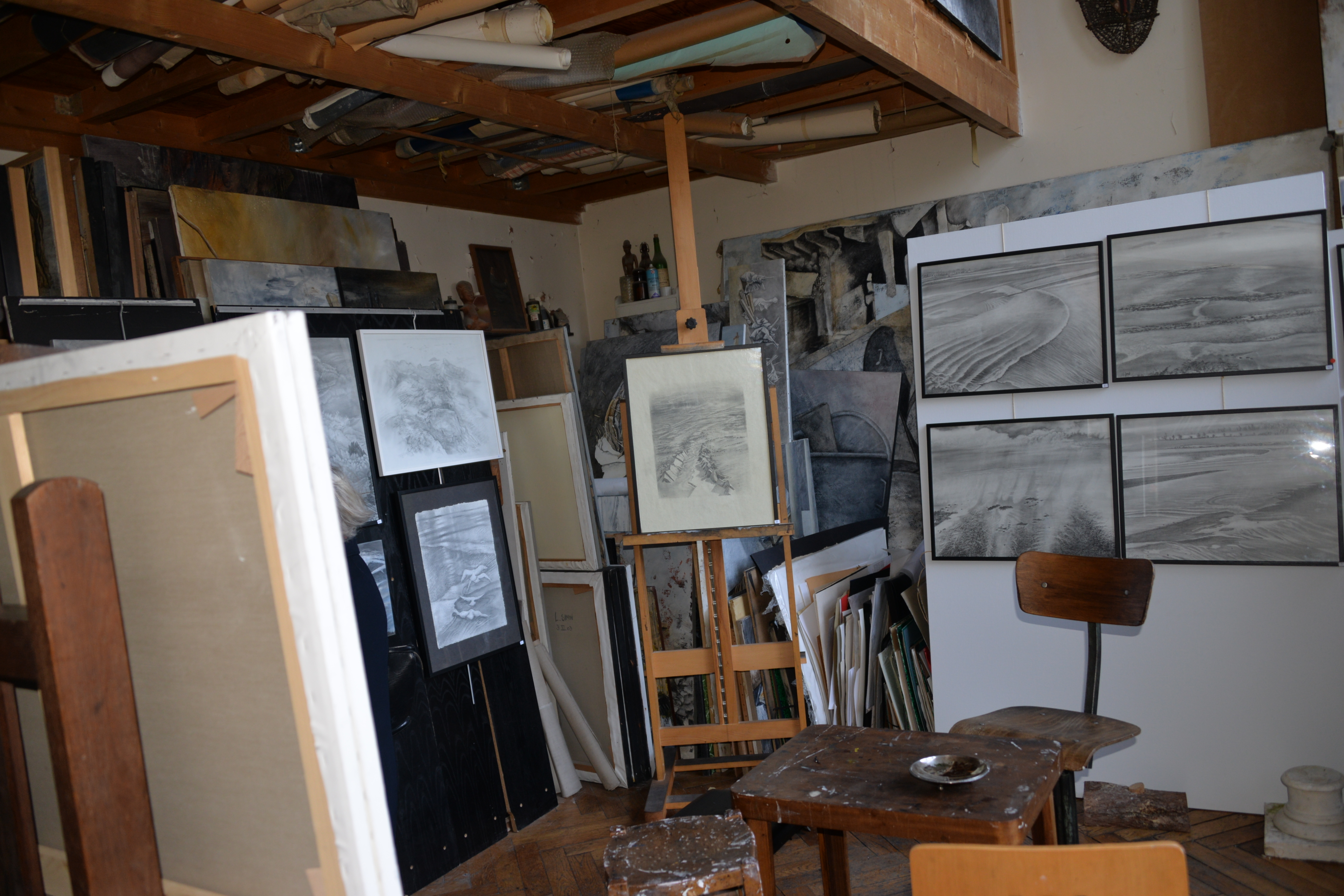 2014 11 23 exposition des artistes Villa Gabriel atelier Laurence Simon